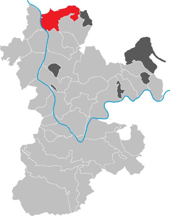 Karte von Sulzbach am Main im Kreis Miltenberg, Bayern, Deutschland.